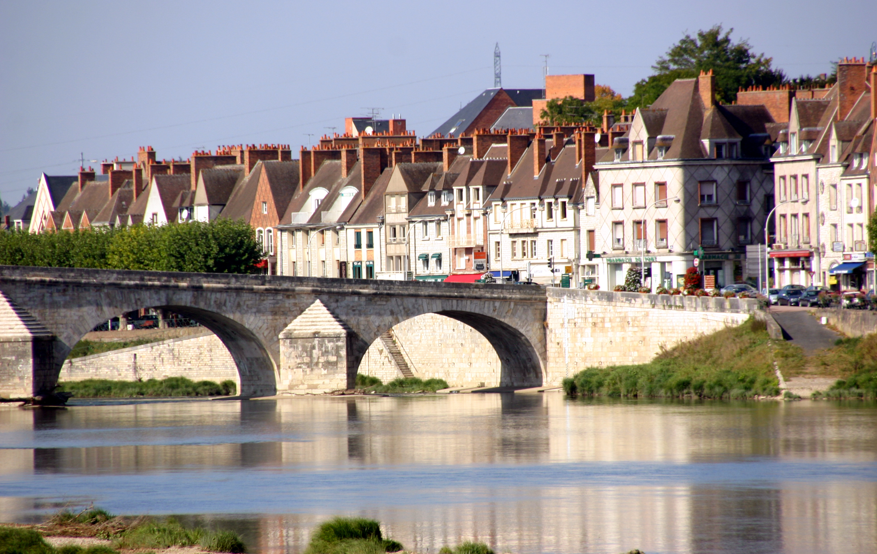 Gien an der Loire